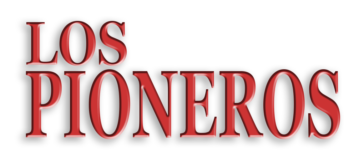 Los pioneros